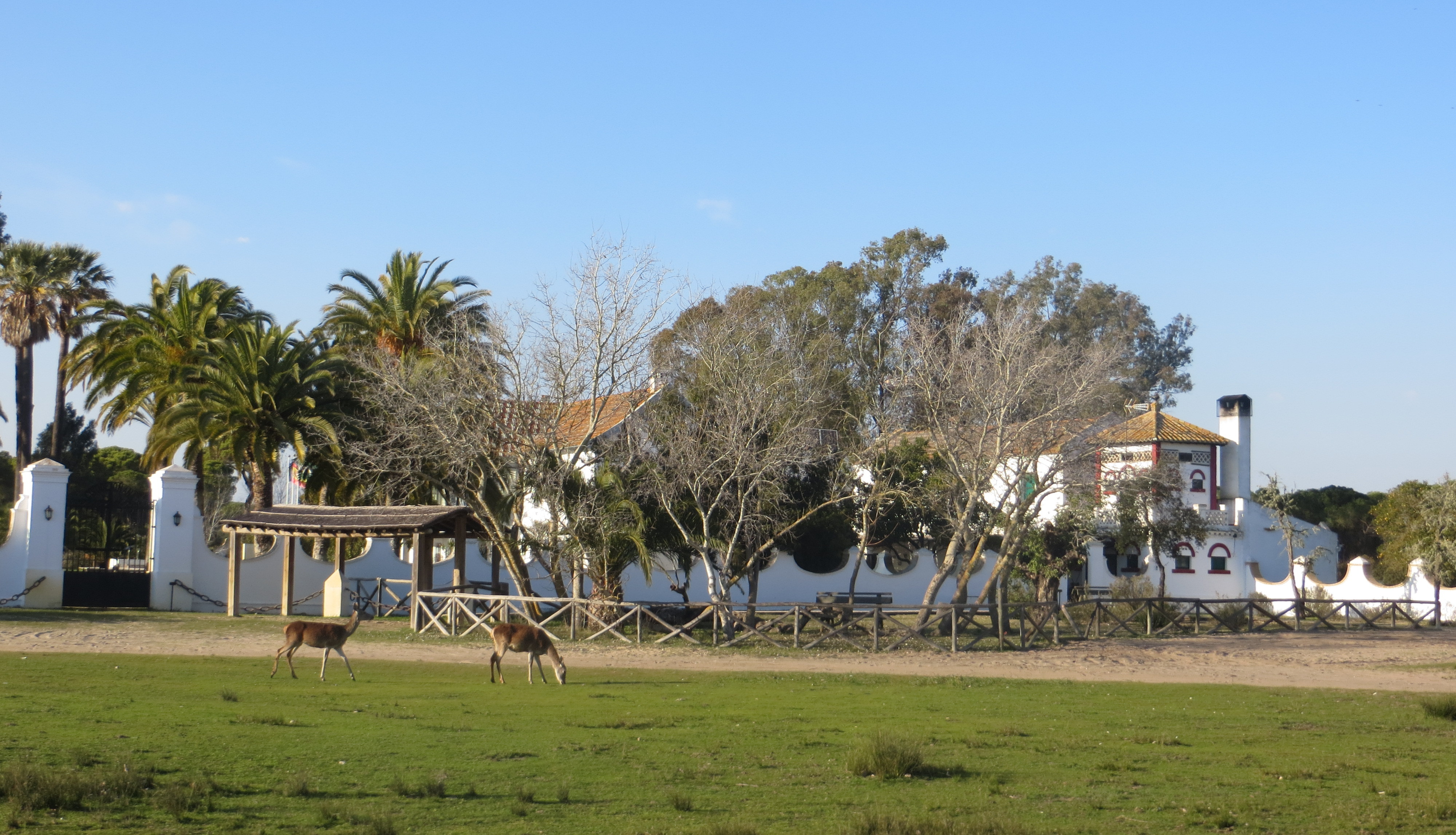 Cérvidos en los exteriores del Palacio de las Marismillas de Doñana